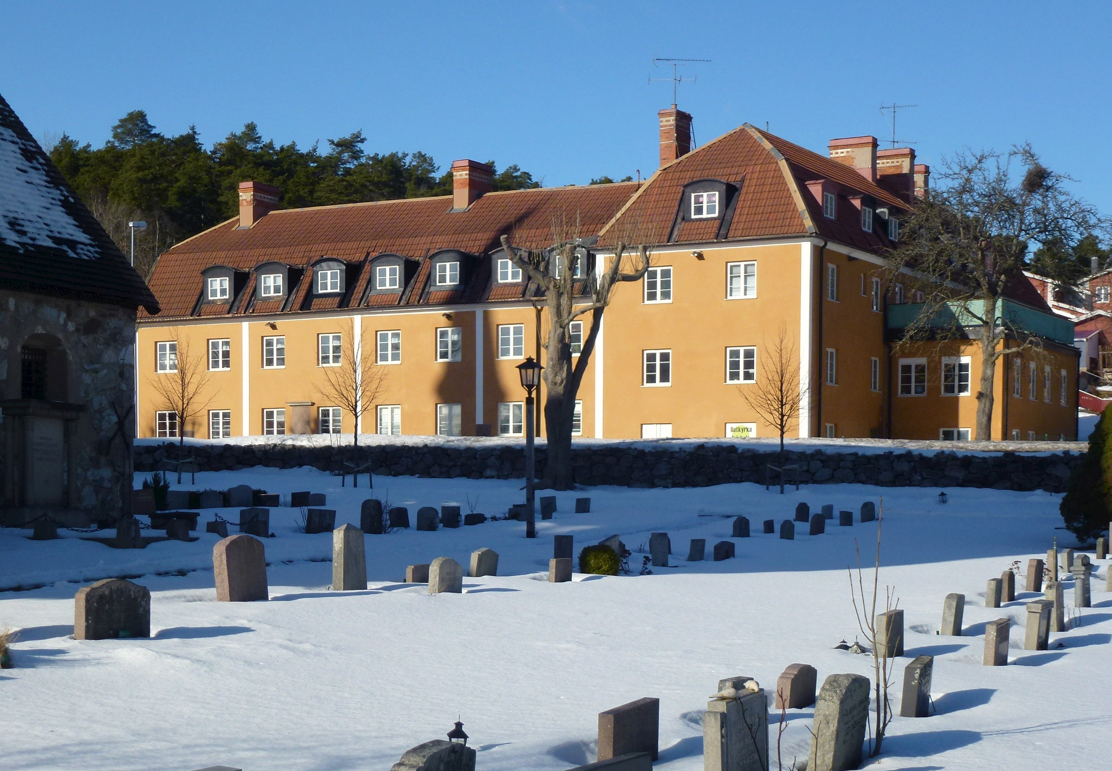 Fattighuset vid Botkyrka kyrka, nu Botkyka friskola